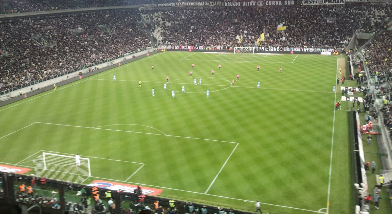 Veduta interna dello Juventus Stadium dalla curva nord durante la partita Juventus-Napoli.